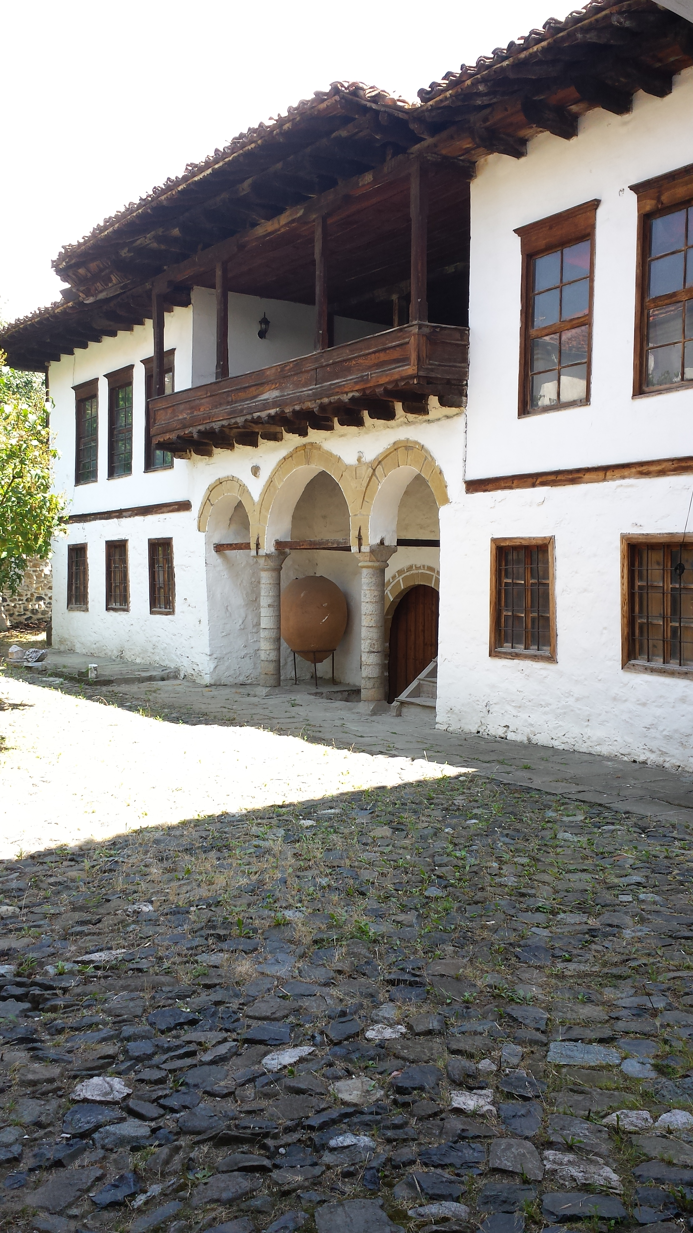 Muzeu Arkeologjik Korce